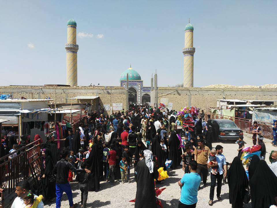 مصرى: مزار السيد يوشع السيد محمد الموسوي الحسيني في العراق محافظة الناصرية ذي قار وهو مزار تاريخي وله كرامات ومعجزات كثيرة